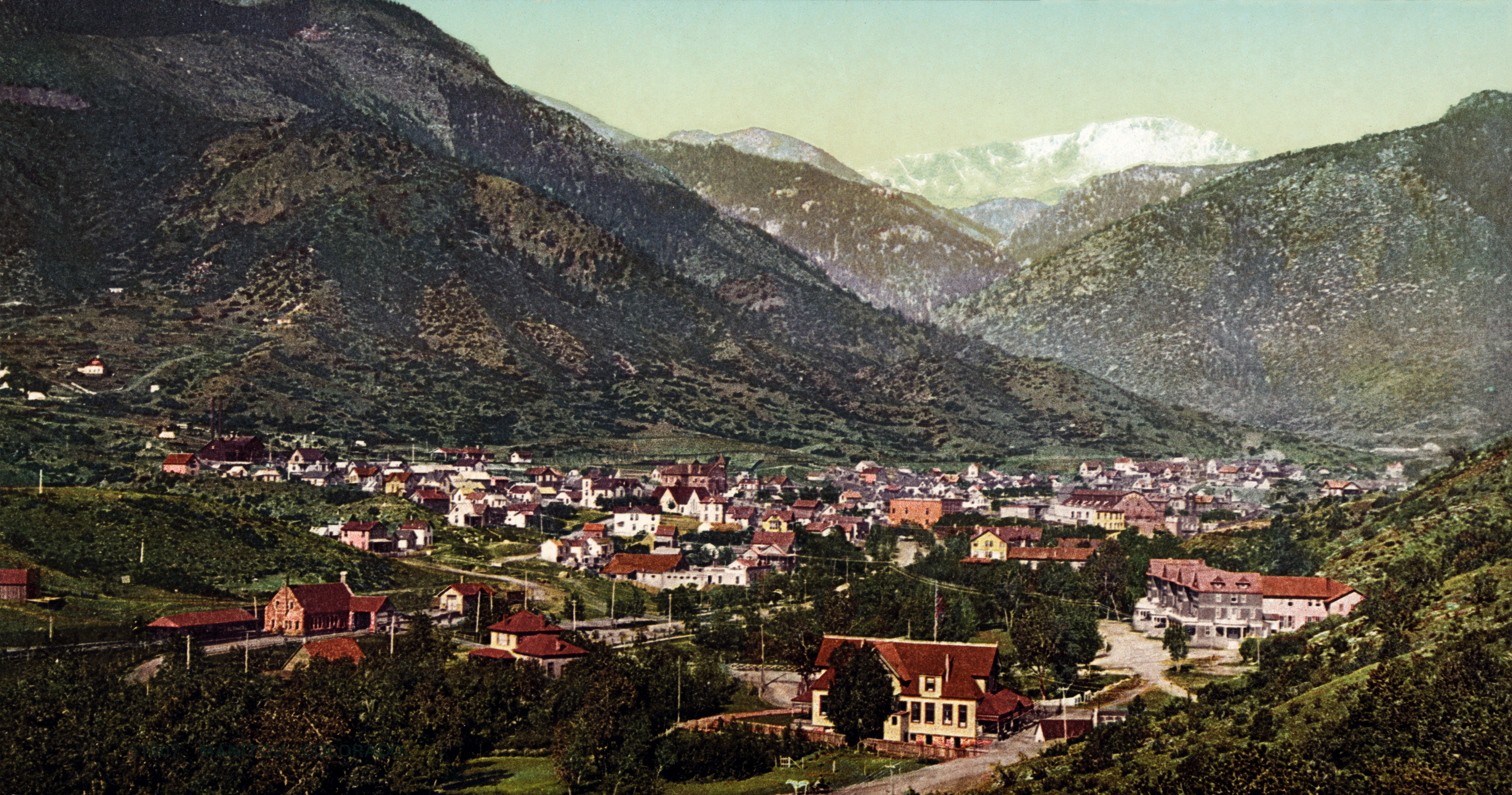 51007. Manitou, Colorado.